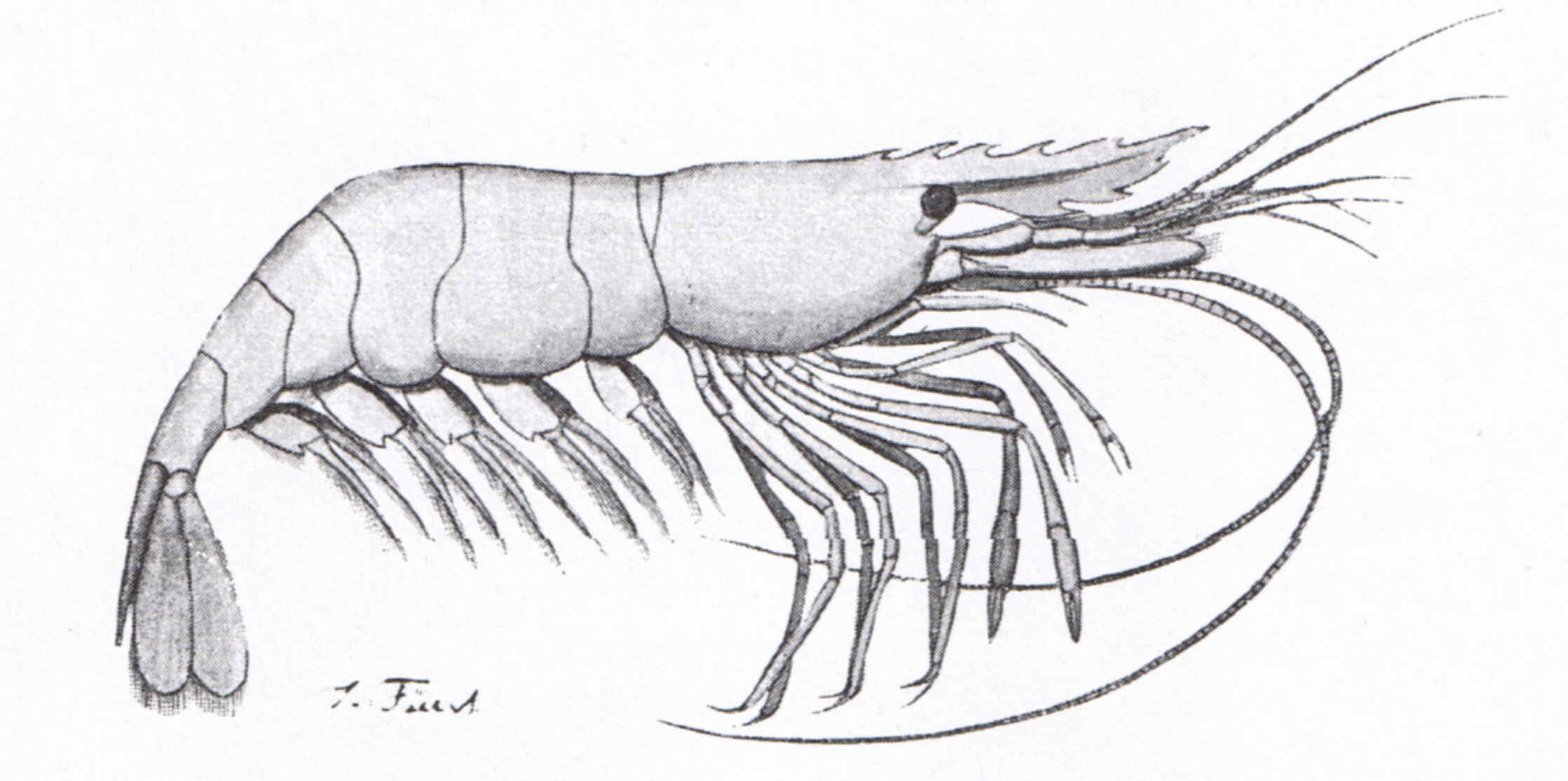 Ostseekrabbe (Leander adspessus), Zeichnung von Julius Fürst um 1895